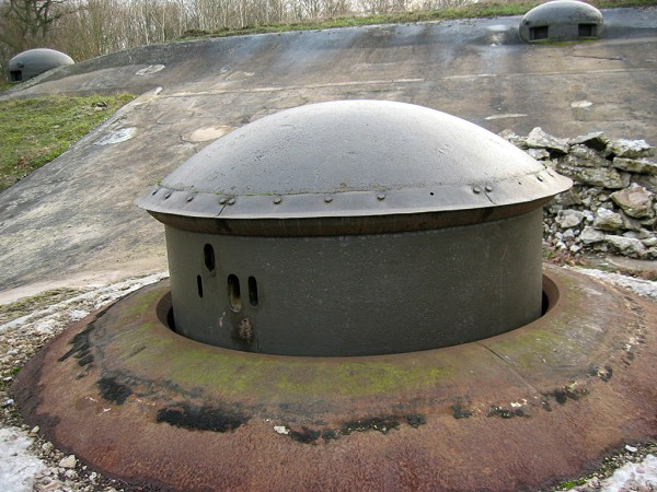 Tourelle mitrailleuse du PO Bois de Karre